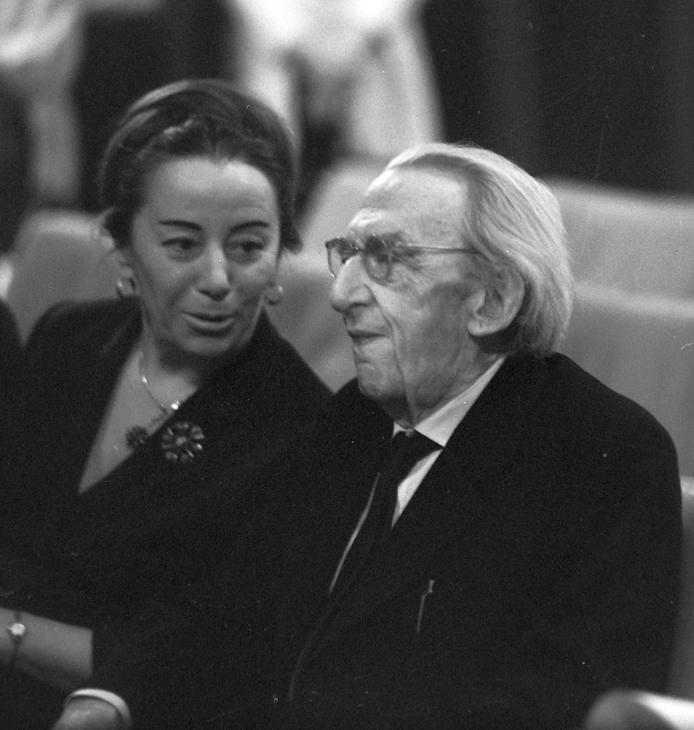 Lukács György filozófus, mellette Déry Tiborné. Location: Hungary Tags: celebrity Title: Lukács György filozófus, mellette Déry Tiborné.